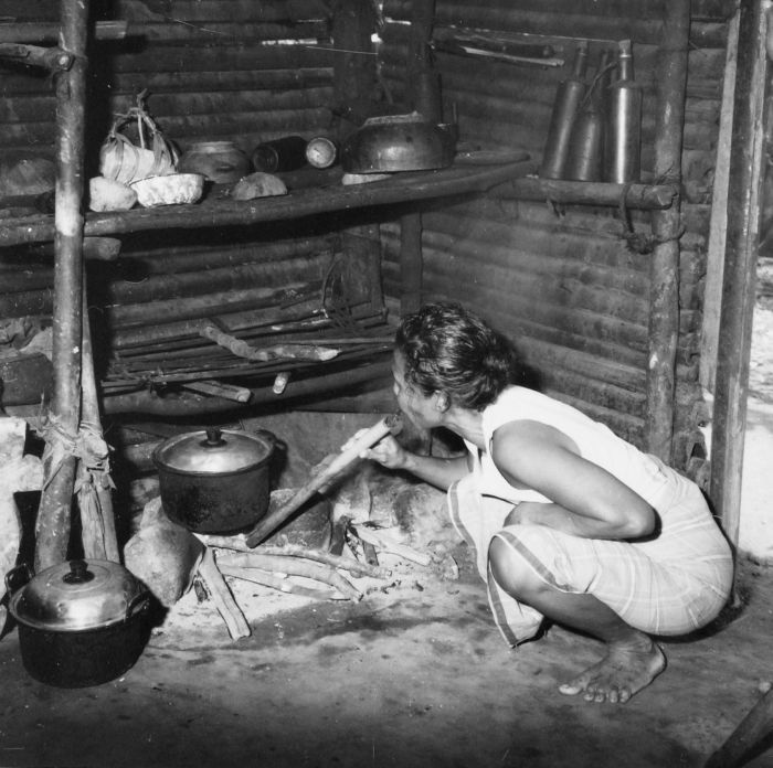 Negatief. Een vrouw blaast een vuur aan met een stuk bamboe